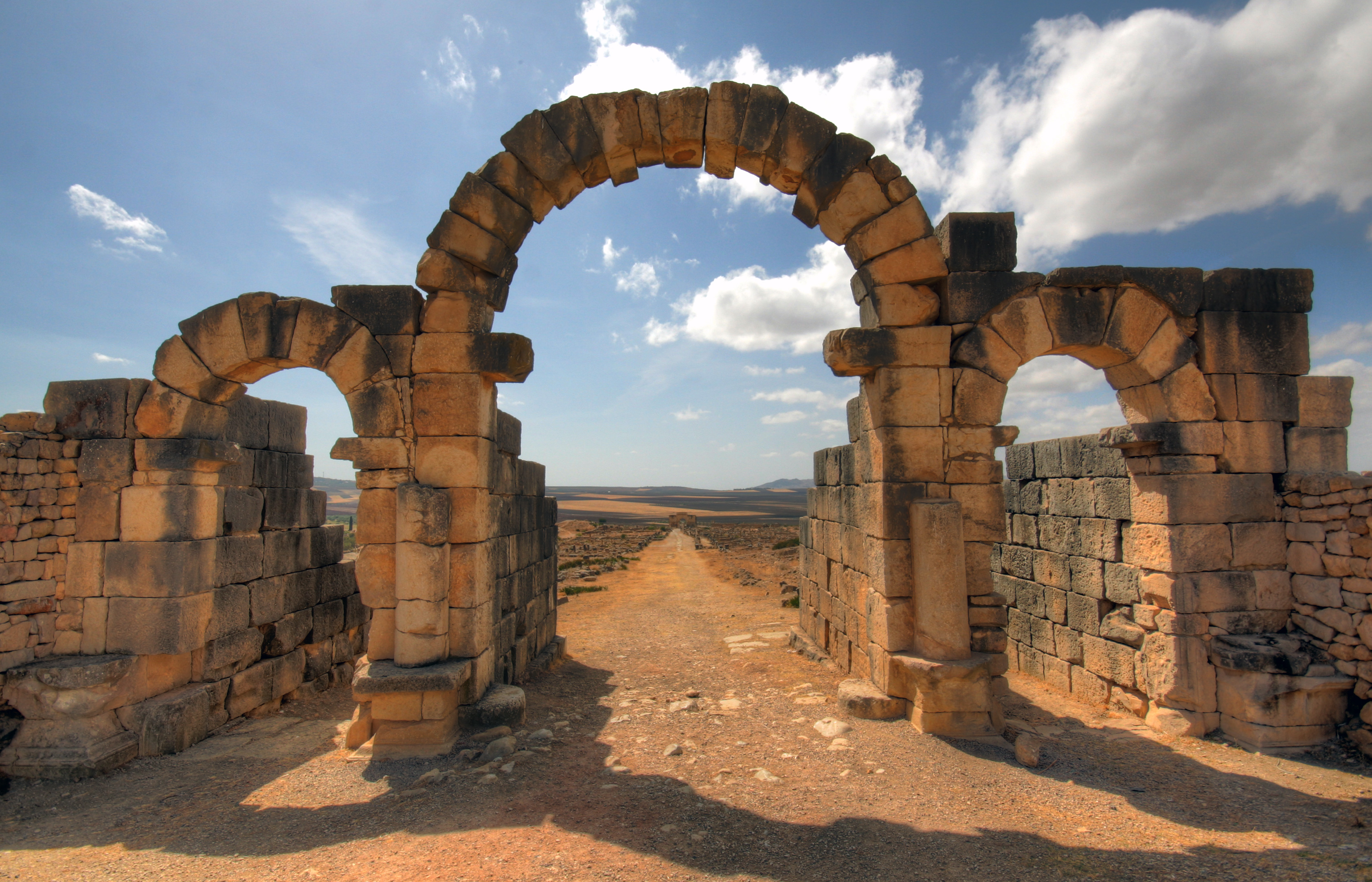 Tingis Gate, Volubilis